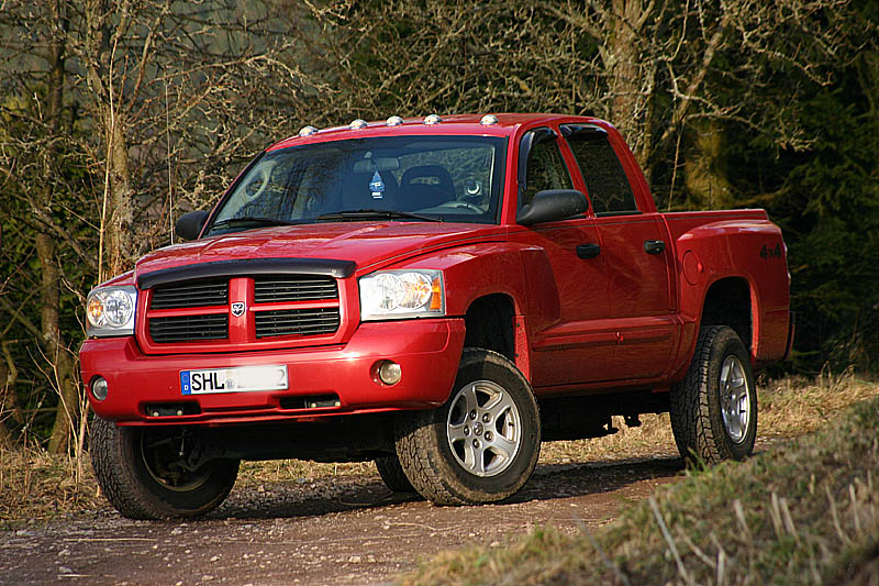 RAM (Dodge) Dakota SLT Sport 2006 Crew Cab